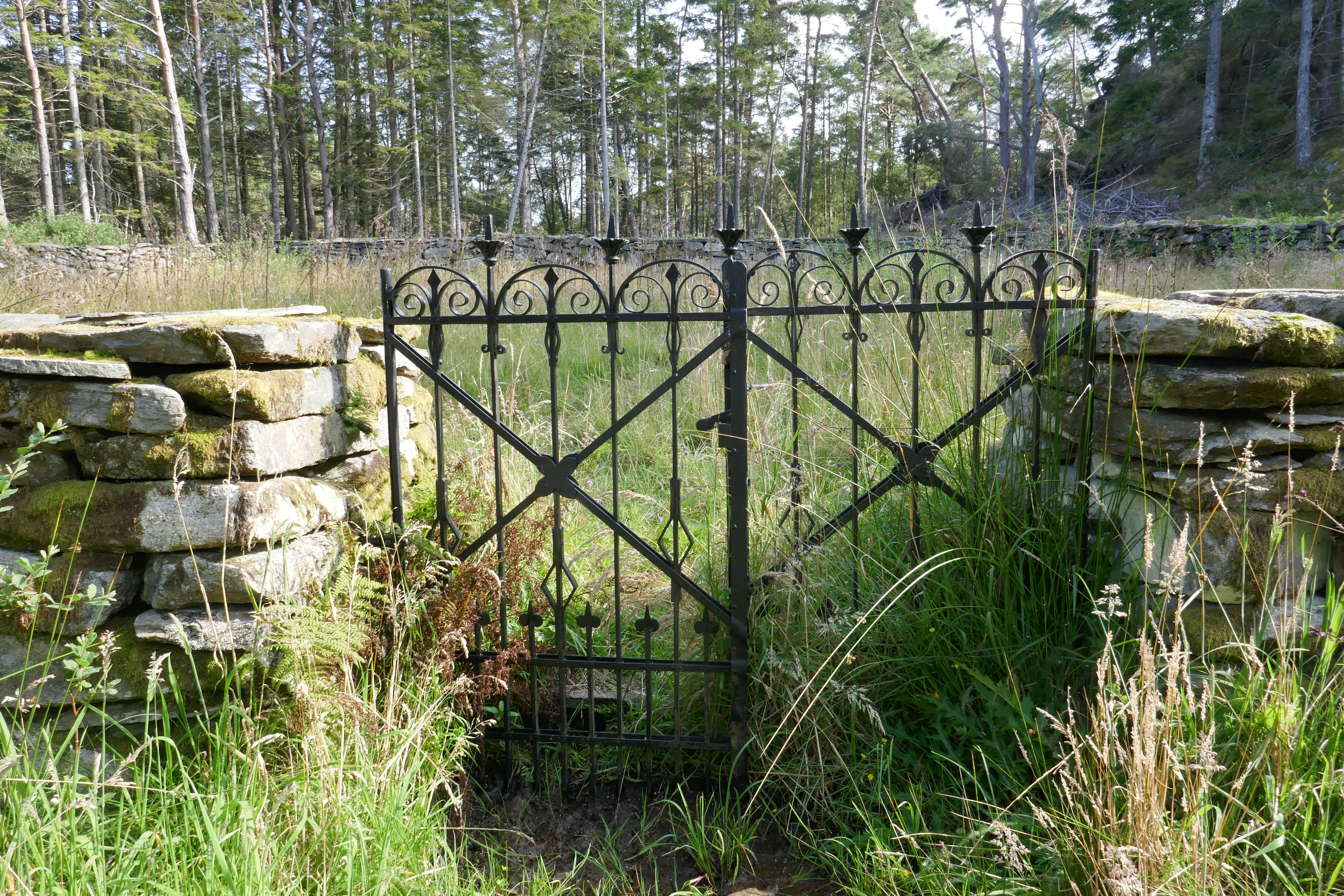 "Kirkegården ved havet": En gammel kolerakirkegård ved Leirvågen utenfor Valevåg i Sveio kommune. Inspirerte Fartein Valen til komposisjonen "Kirkegården ved havet"